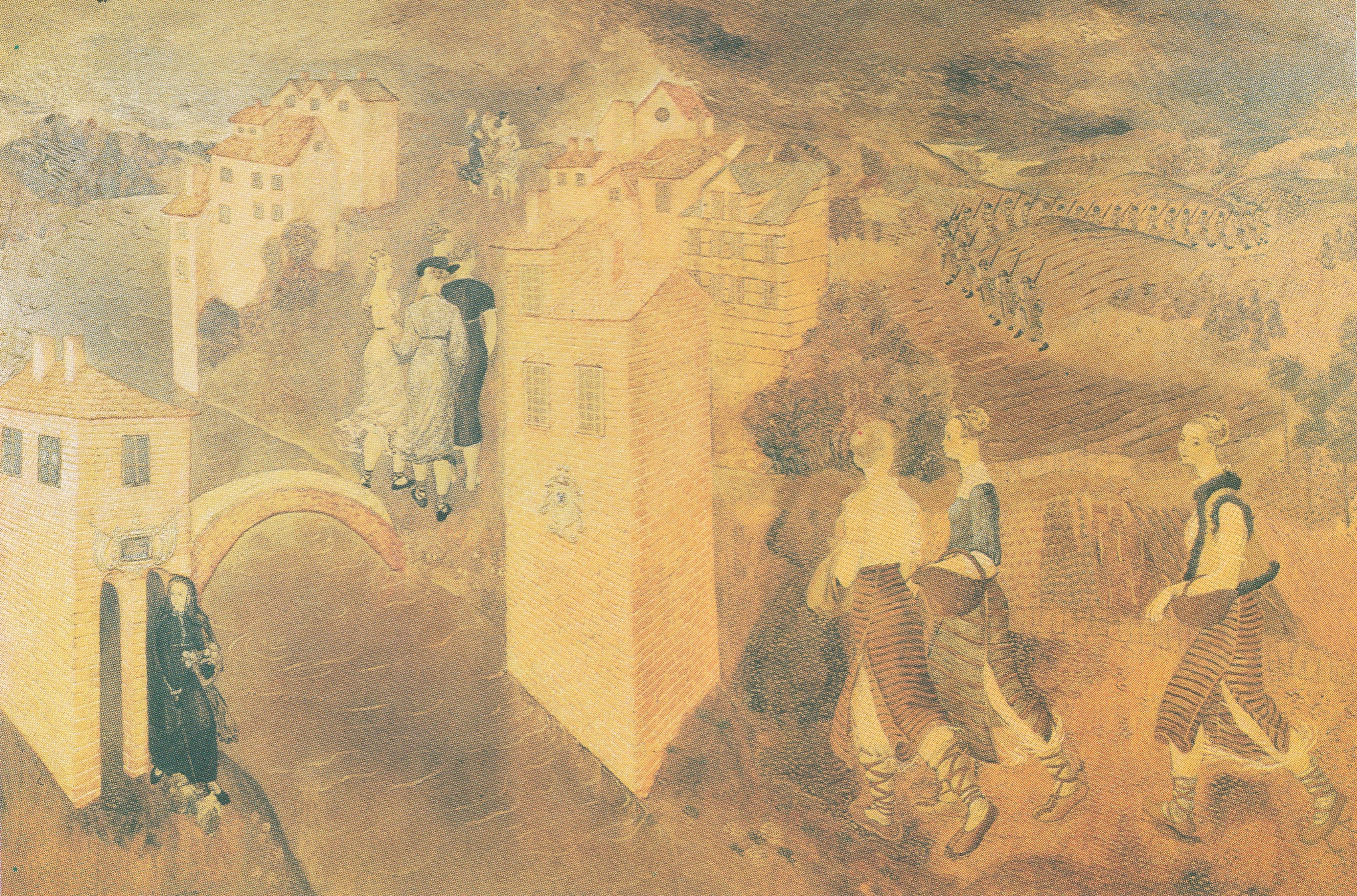 Gemälde Manoeuvres von Jeremi Kubicki